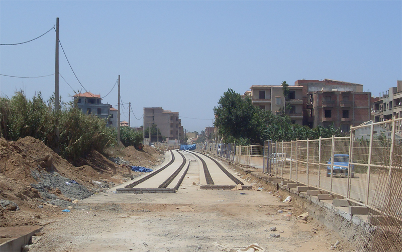 Travaux du tramway d'Alger